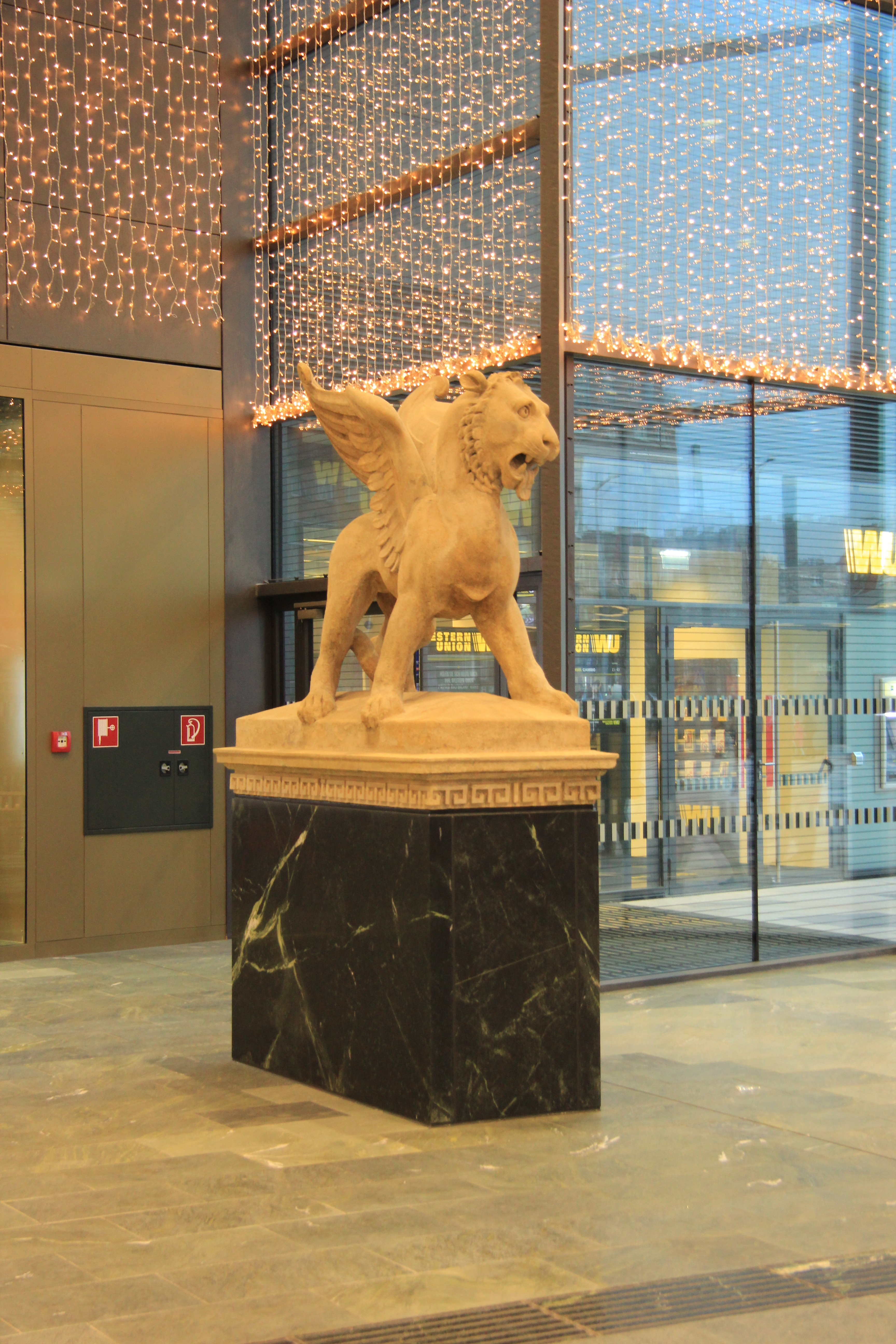 Bahnhofshalle nahe dem Ausgang zum Südtirolerplatz mit Markuslöwe des Wiener Hauptbahnhofs im Weihnachtsschmuck